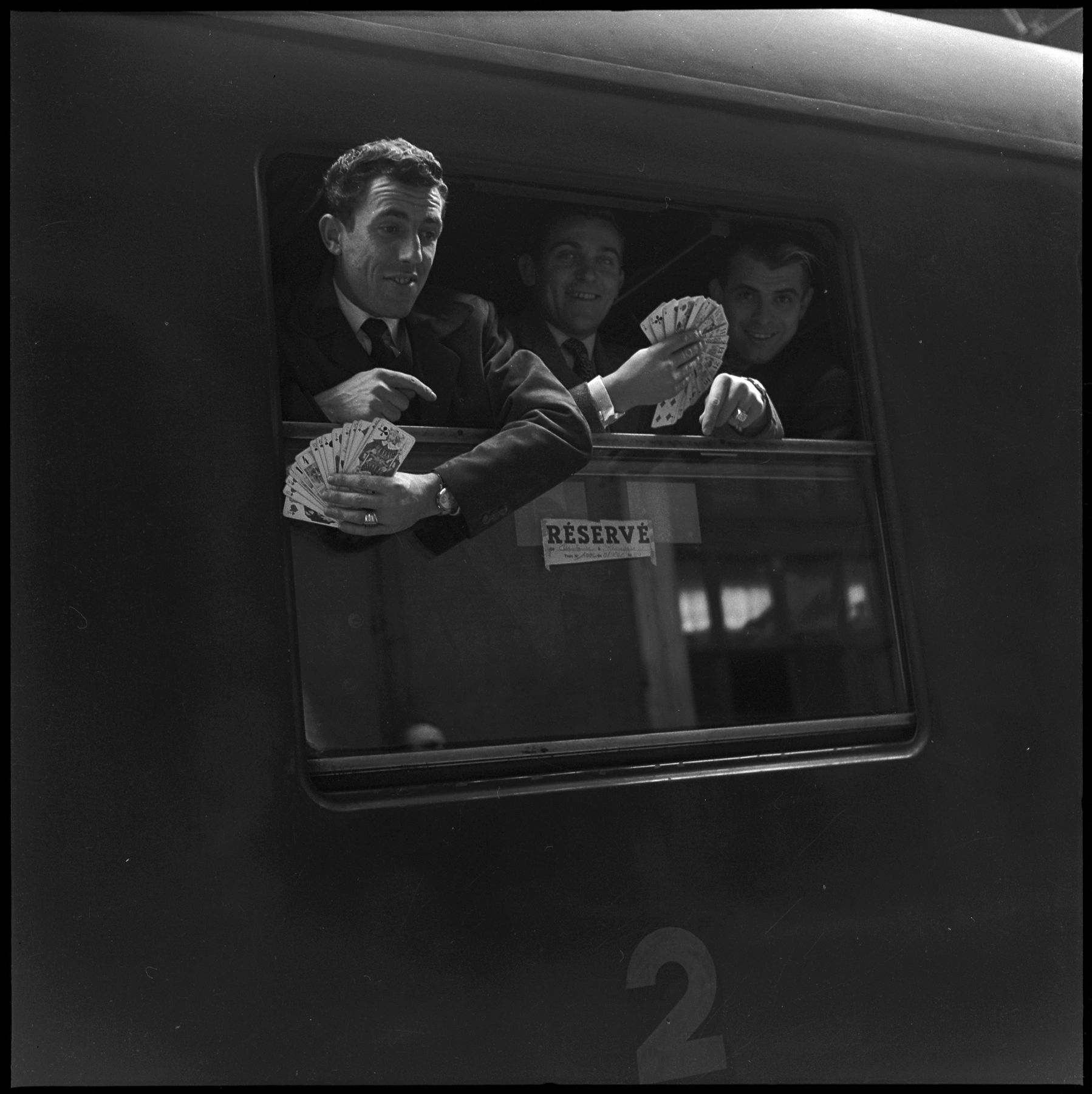 Gare Matabiau, 64 boulevard Pierre-Semard. 1958-1959. Vue de trois joueurs du Toulouse Football Club, dont Pierre Cahuzac et Ernest Schultz, à la fenêtre d'un wagon avec un jeu de cartes, avant le départ du train.